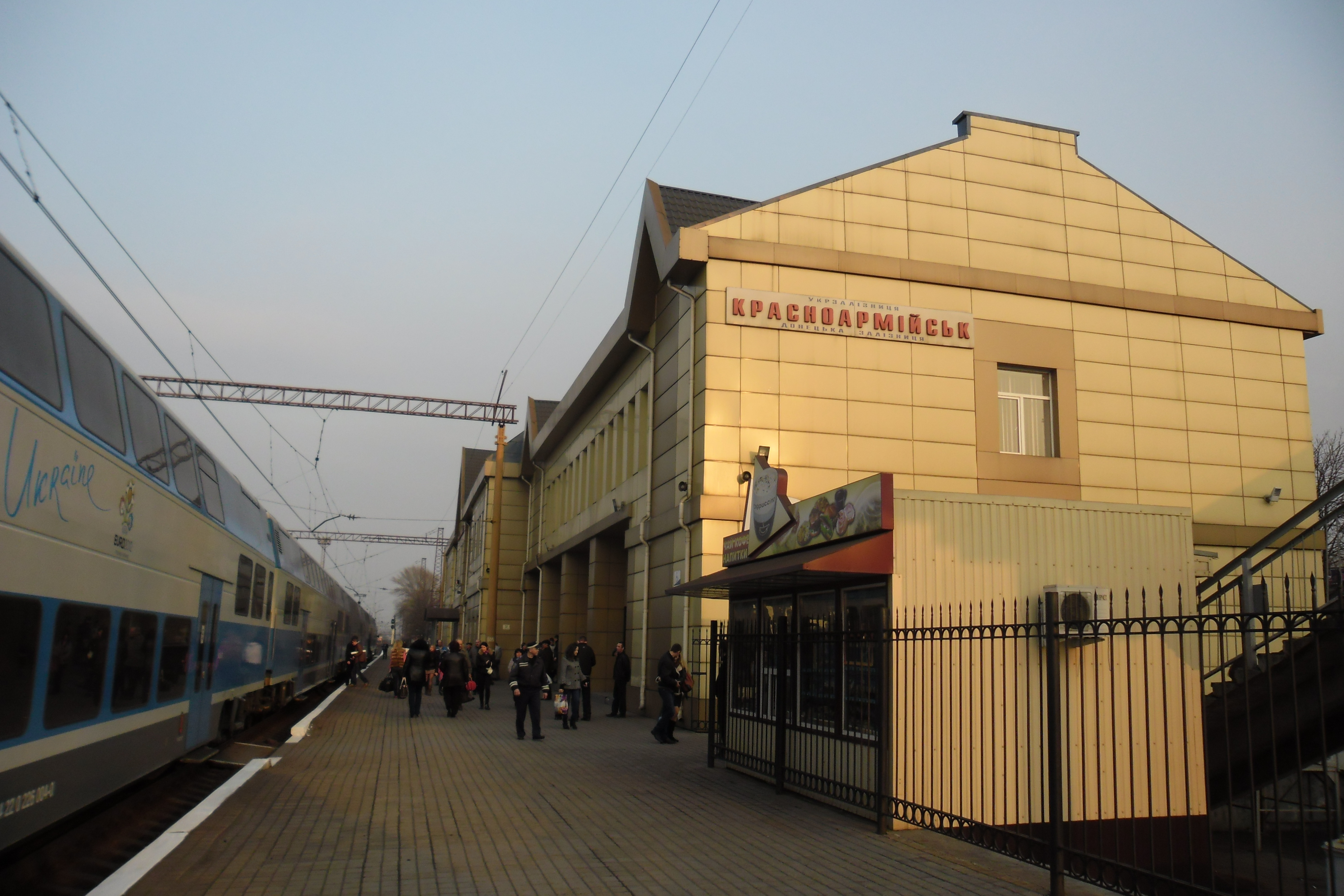 Вокзал станции Красноармейск (Донецкая область, Украина)